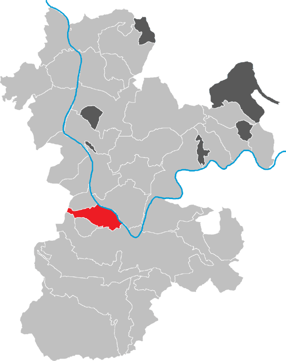 Karte von Kleinheubach im Kreis Miltenberg, Bayern, Deutschland.